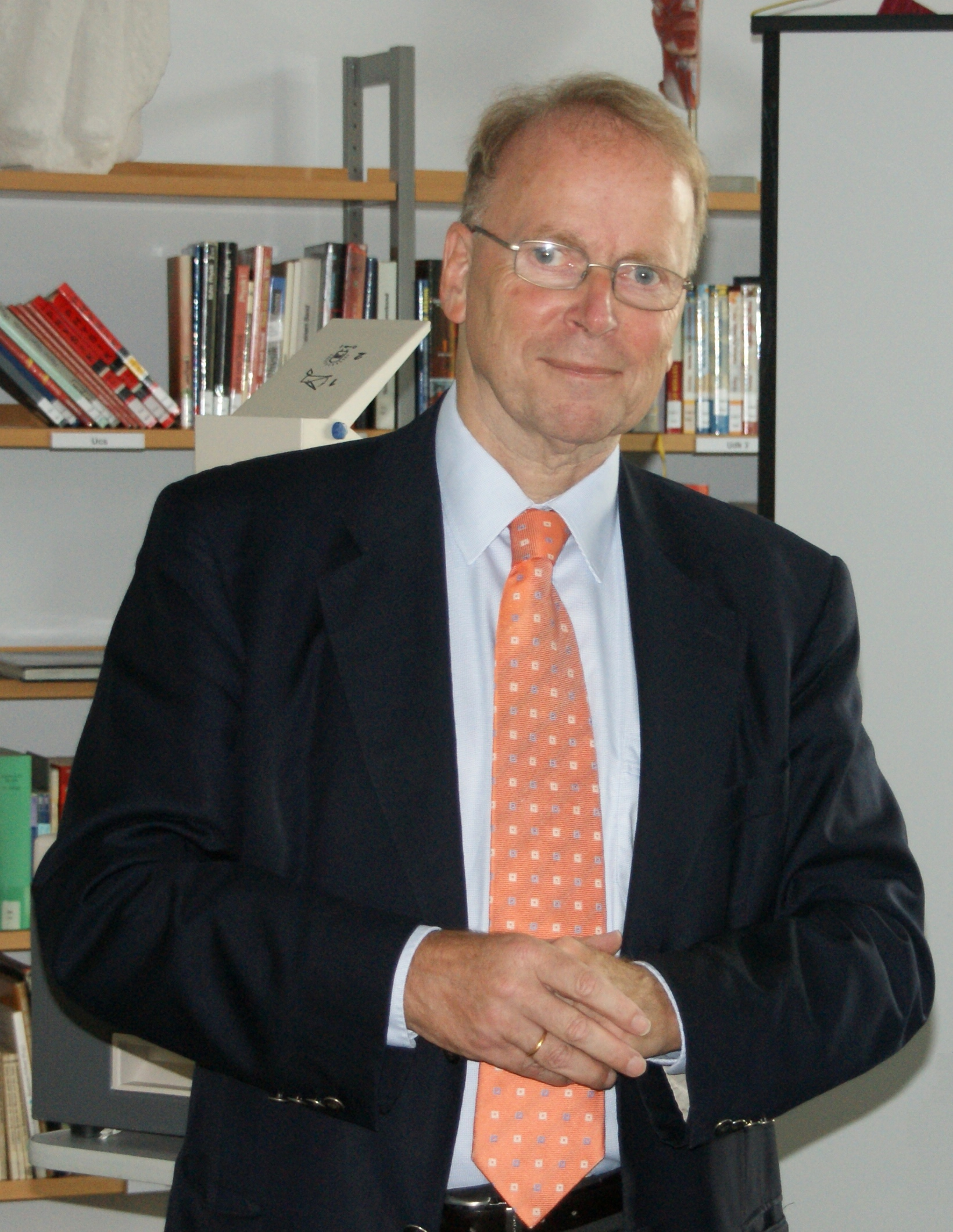 Gerd Langguth, visit at the CJD Christophorusschule Königswinter